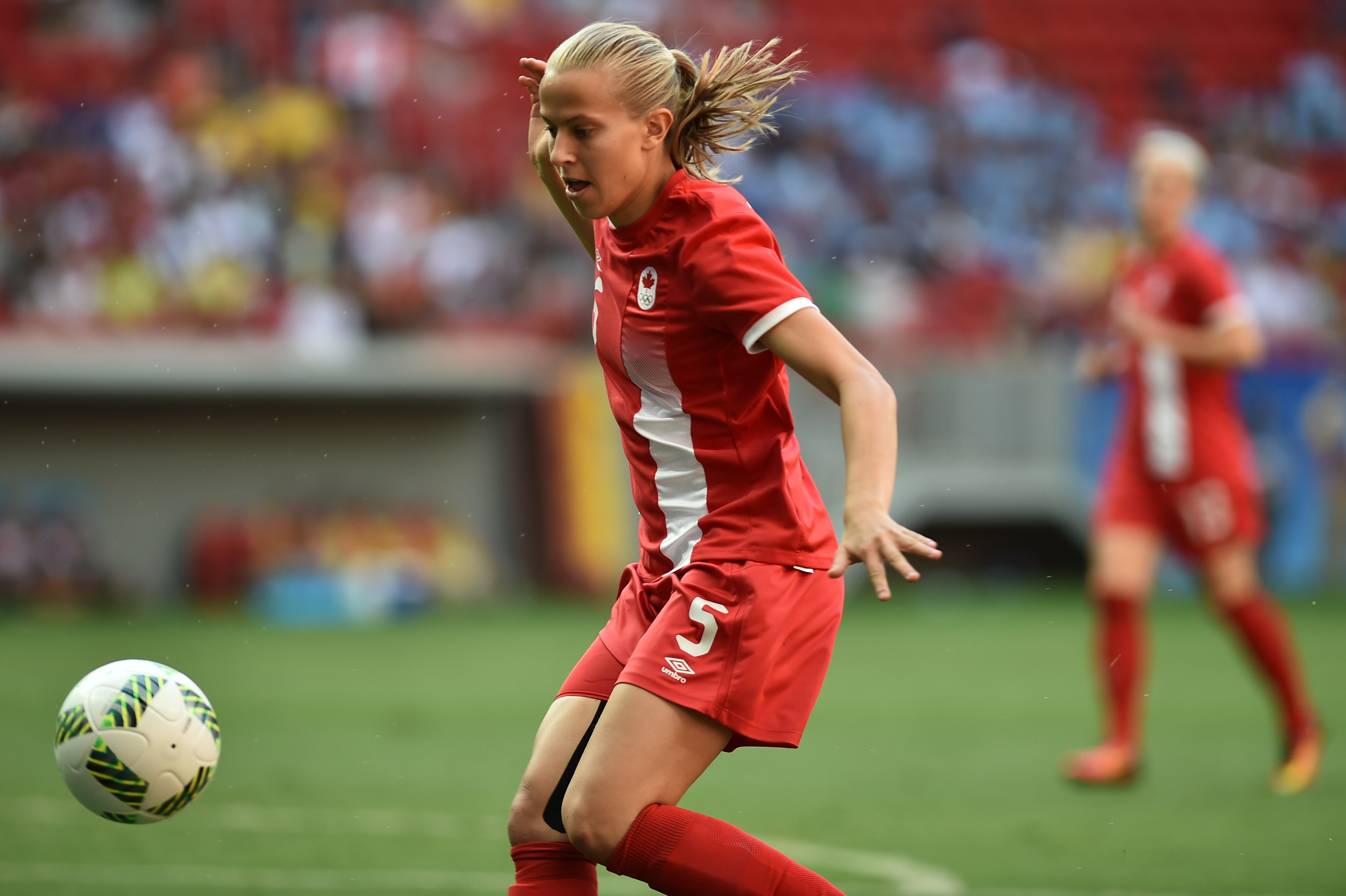 Estádio Nacional de Brasília Mané Garrincha, Brasília, DF, Brasil, 9/8/2016 Foto: Andre Borges/Agência Brasília Alemanha e Canadá jogam nesta terça-feira (9), no Estádio Mané Garrincha, pelo grupo F do futebol feminino nas Olimpíadas 2016.